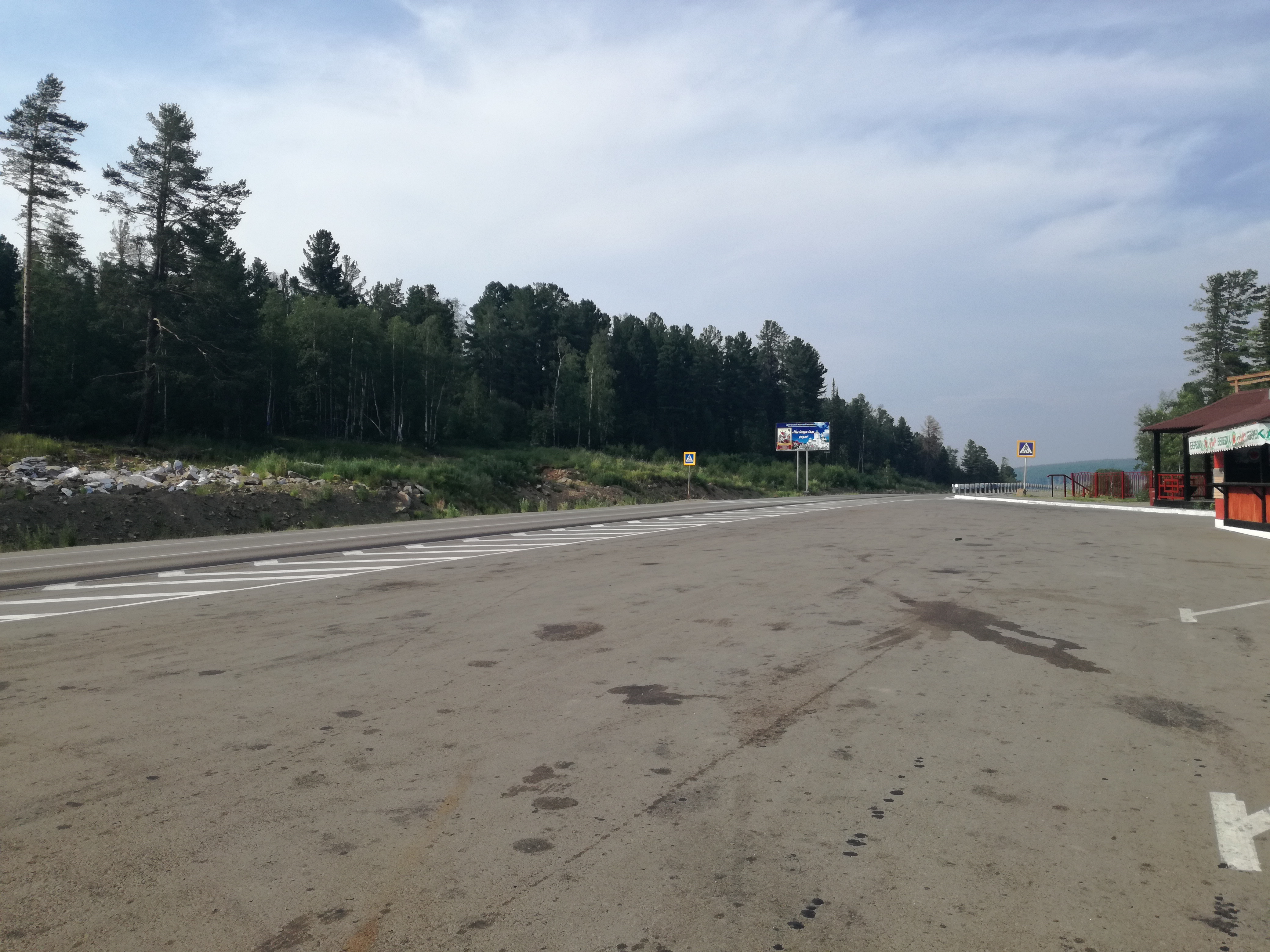 Перевал Пыхта